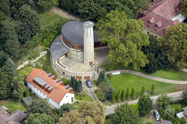 Balatonboglár Evangélikus templom légi fotó